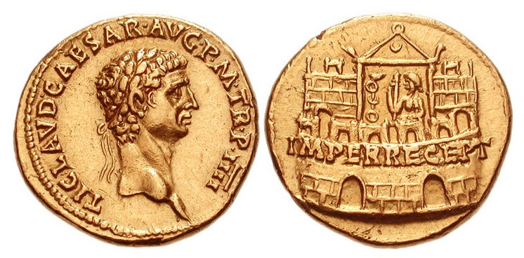 Claudius. AD 41-54. AV Aureus (19mm, 7.66 g, 1h). Rome mint. Struck AD 44/5.Laureate head rightIMPER RECEPT, Claudius seated left, holding scepter; to left, signum; all within distyle building with crescent in pediment and flanked by crenelated walls with arched entries; all set on crenelated wall with two arched entries. RIC I 25; von Kaenel Type 22 (V332/R339; an unlisted die combination); Calicó 361a.